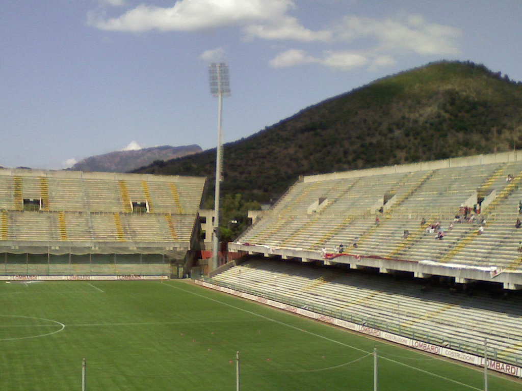 Interno dello Stadio Arechi (Salerno, Italy)